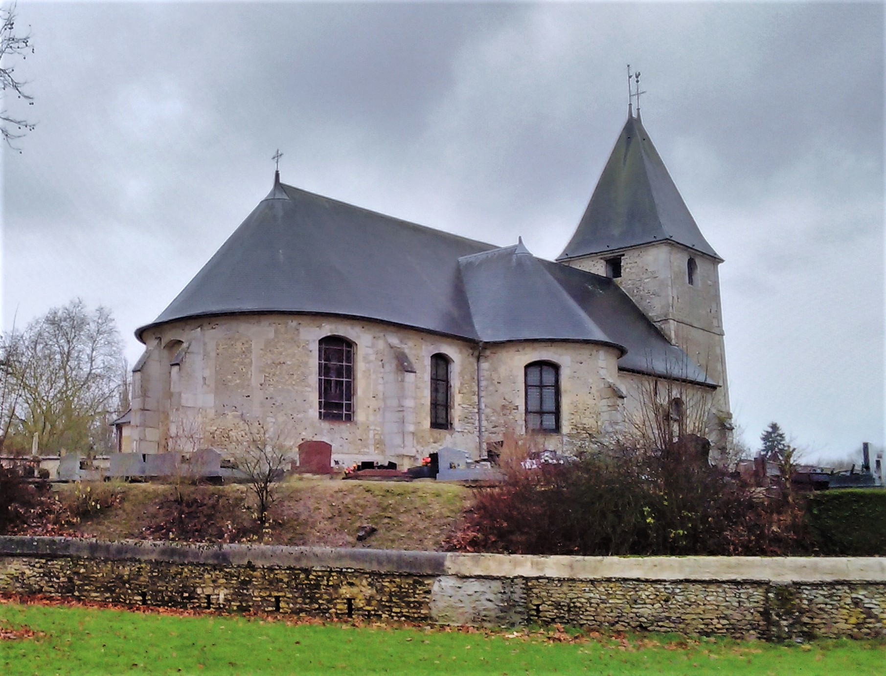 Tour de campagne du 16 décembre 2019.